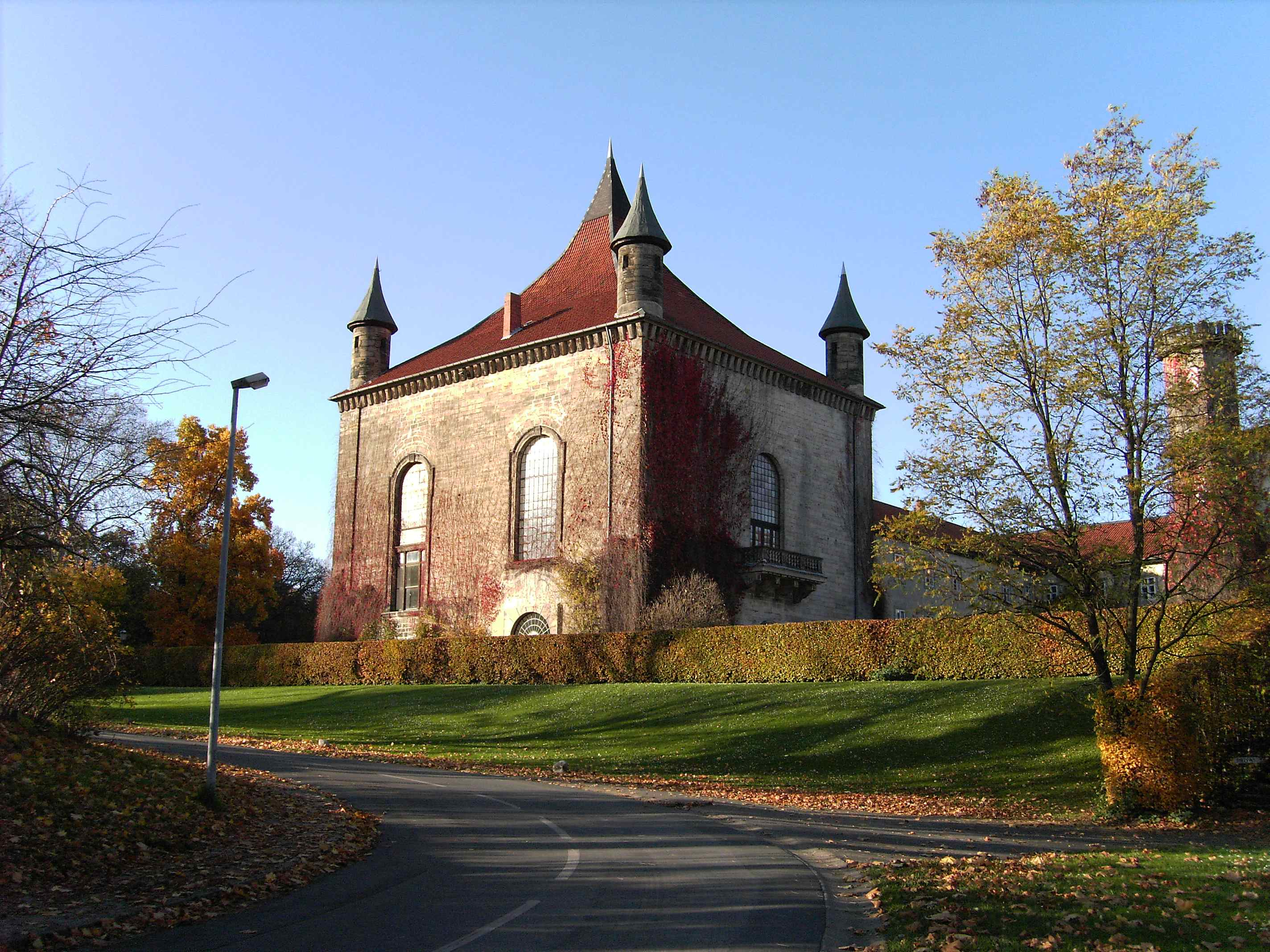 Derneburg Castle, near Hildesheim.